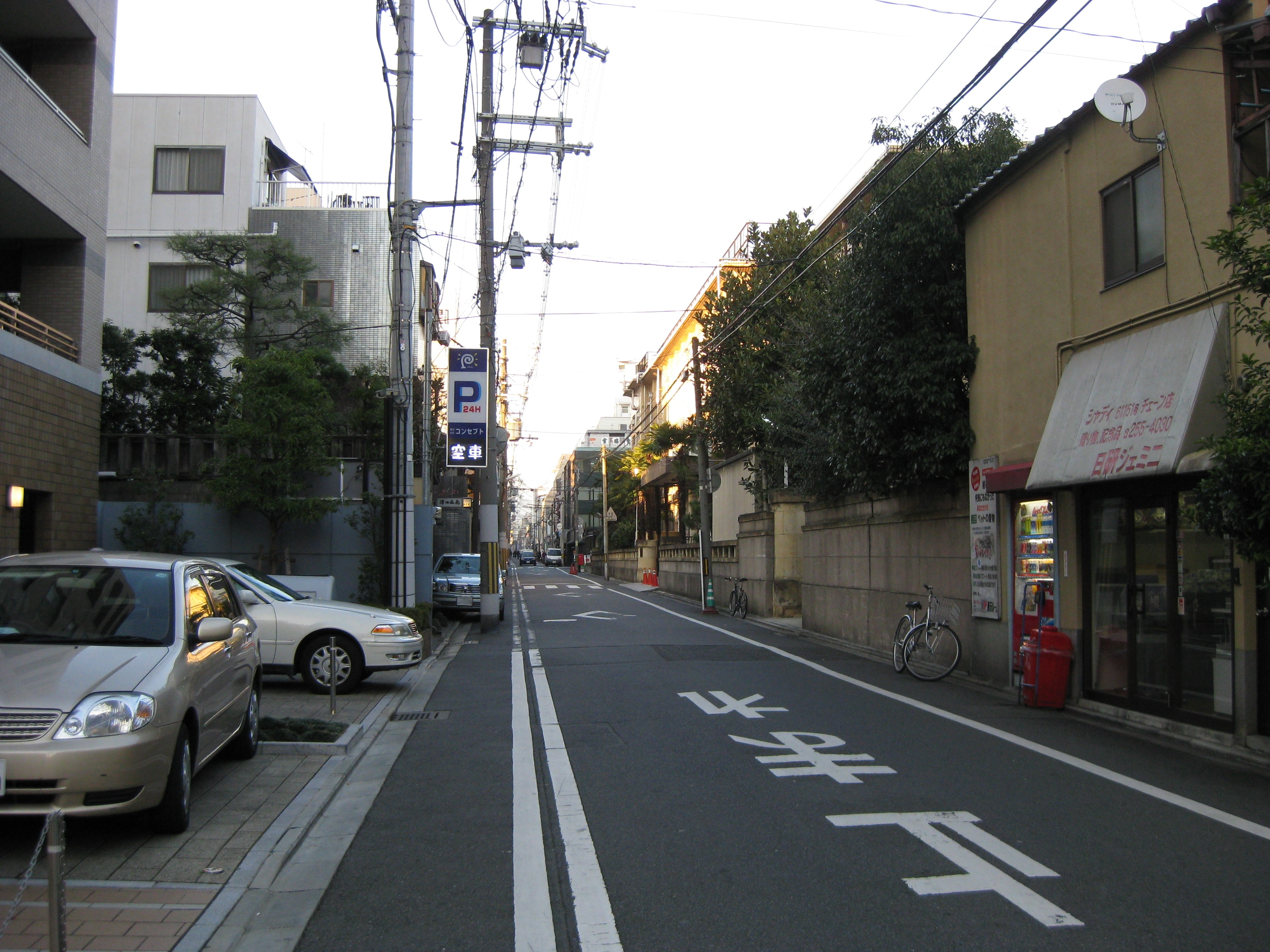 富小路通。蛸薬師通より北方向